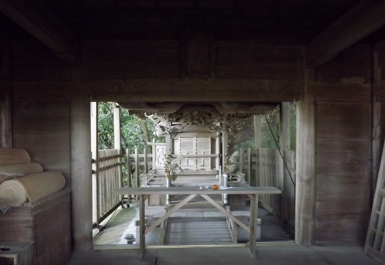 室戸市 一木神社の奥殿